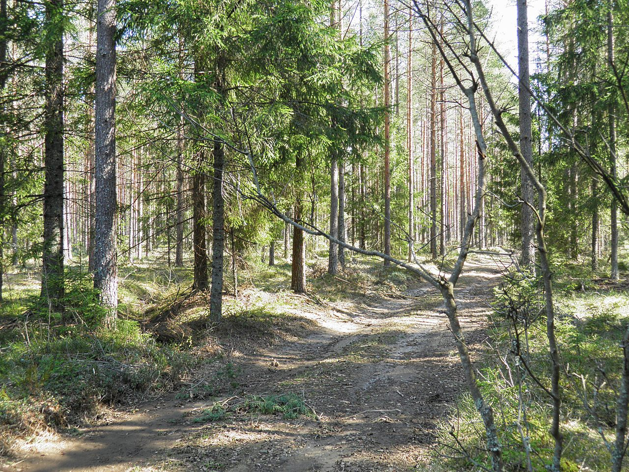 лесная дорожка | meža ceļš